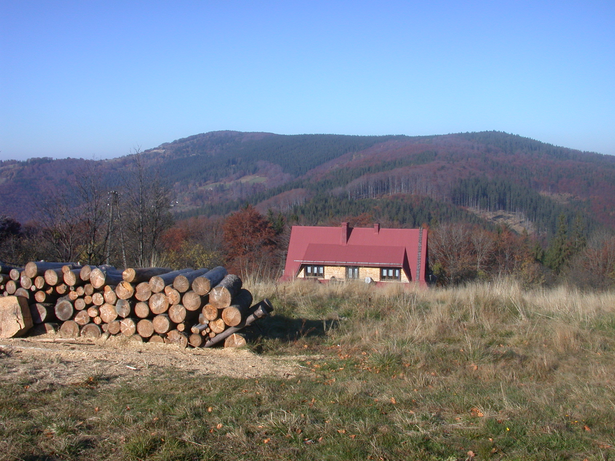 Widok na Równicę z hali pod Orłową, w dole prywatne schronisko Chata na Orłowej.